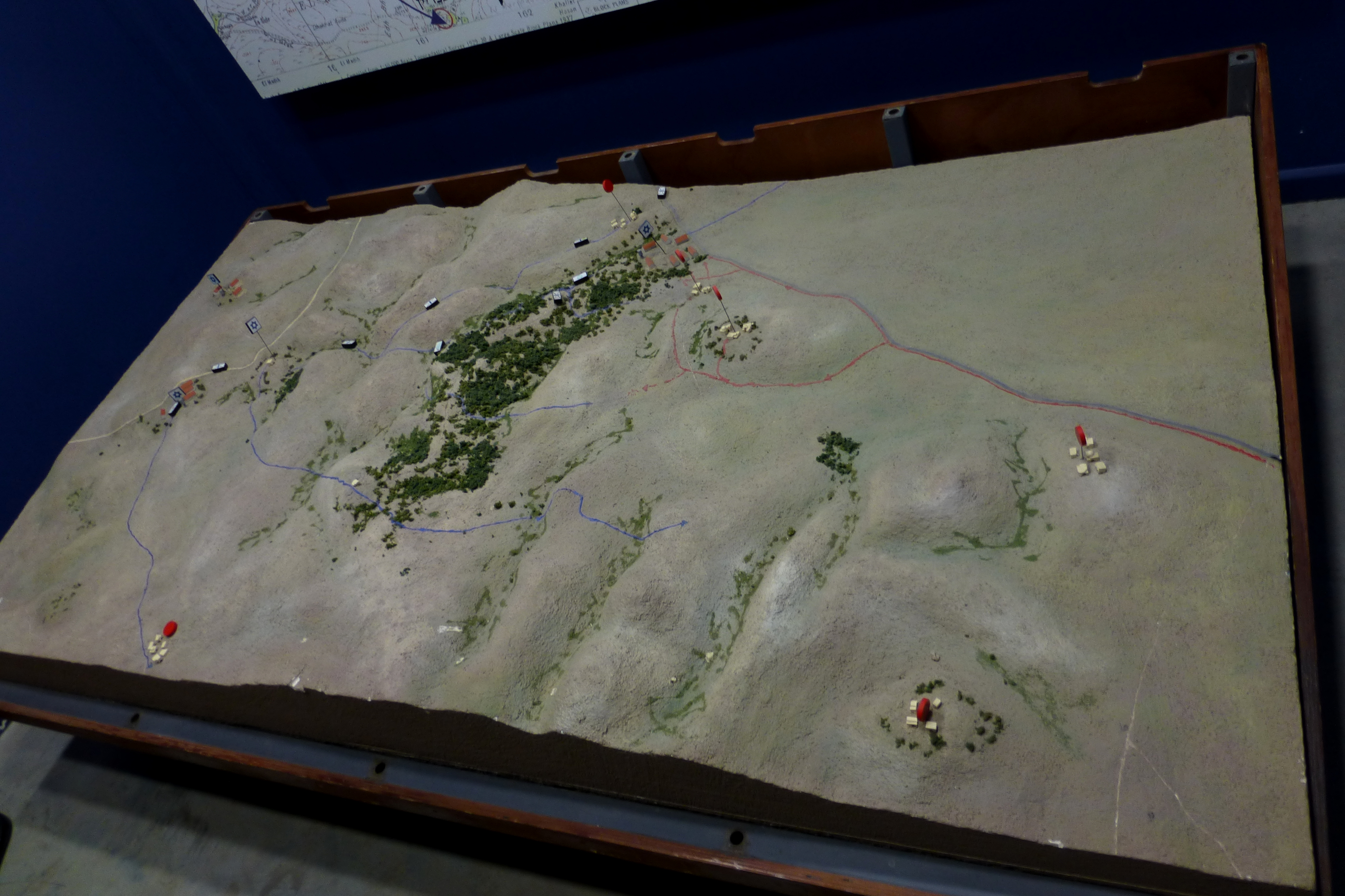 ג'וערה הוא בסיס גדנ"ע ומוזיאון הנמצאים על גבעה ברמות מנשה, במיקום היסטורי ששימש בעבר כבסיס ההדרכה המרכזי למפקדים של ארגון "ההגנה". שמה העברי של הגבעה הוא "גבעת נֹח".